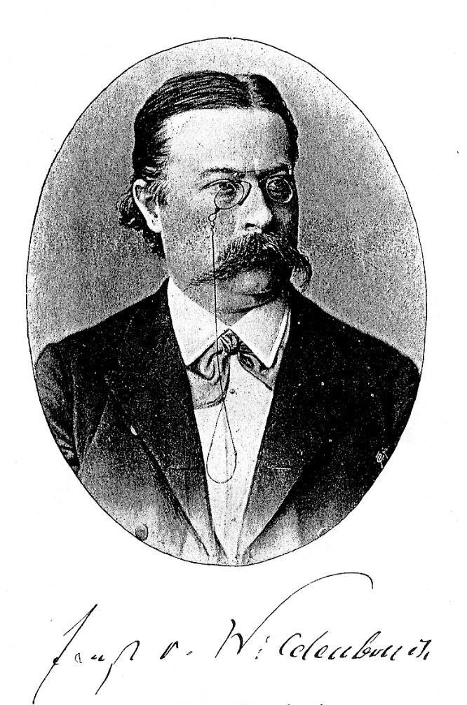 Ernst von Wildenbruch. Holzstich aus Koenneckes Bilderatlas zur Geschichte der deutschen Literatur, Marburg 1895. Es existieren keine Rechte an diesem Bild. -- Goerdten 19:12, 11. Jul 2005 (CEST)